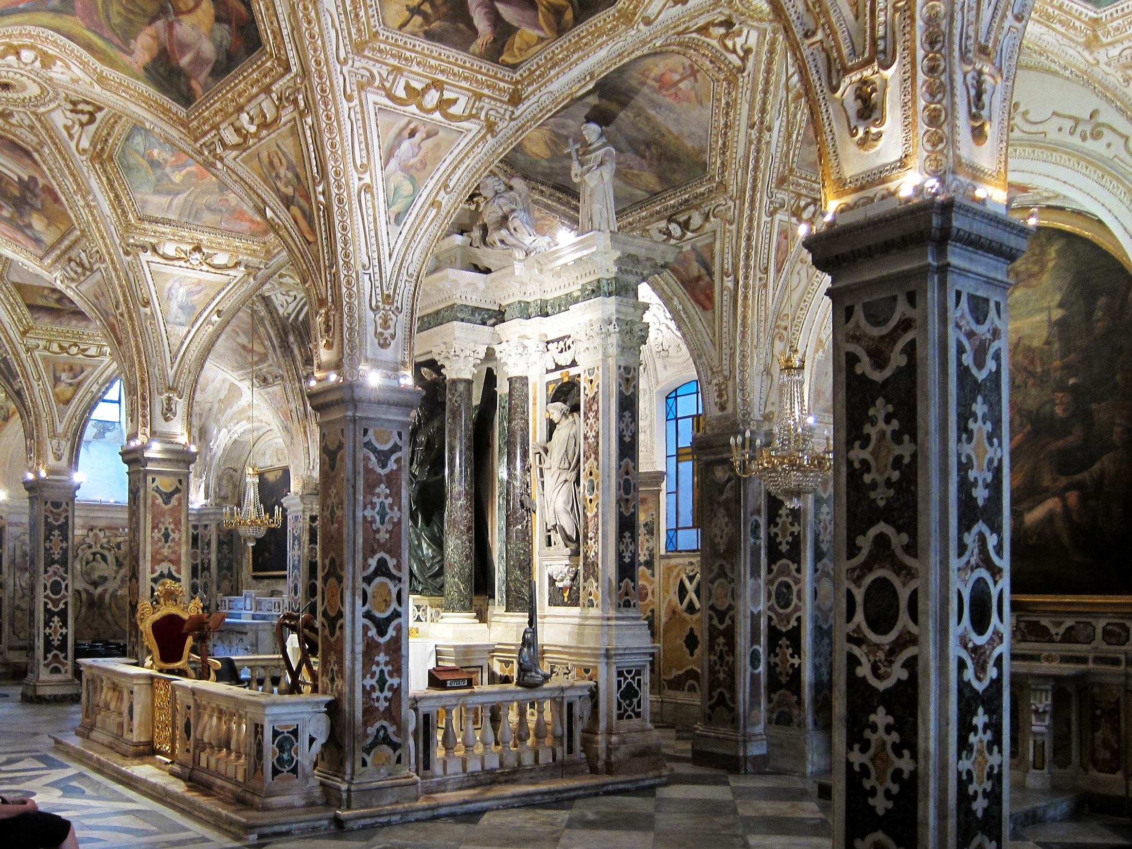 La crypte du Duomo d'Amalfi (Italie).